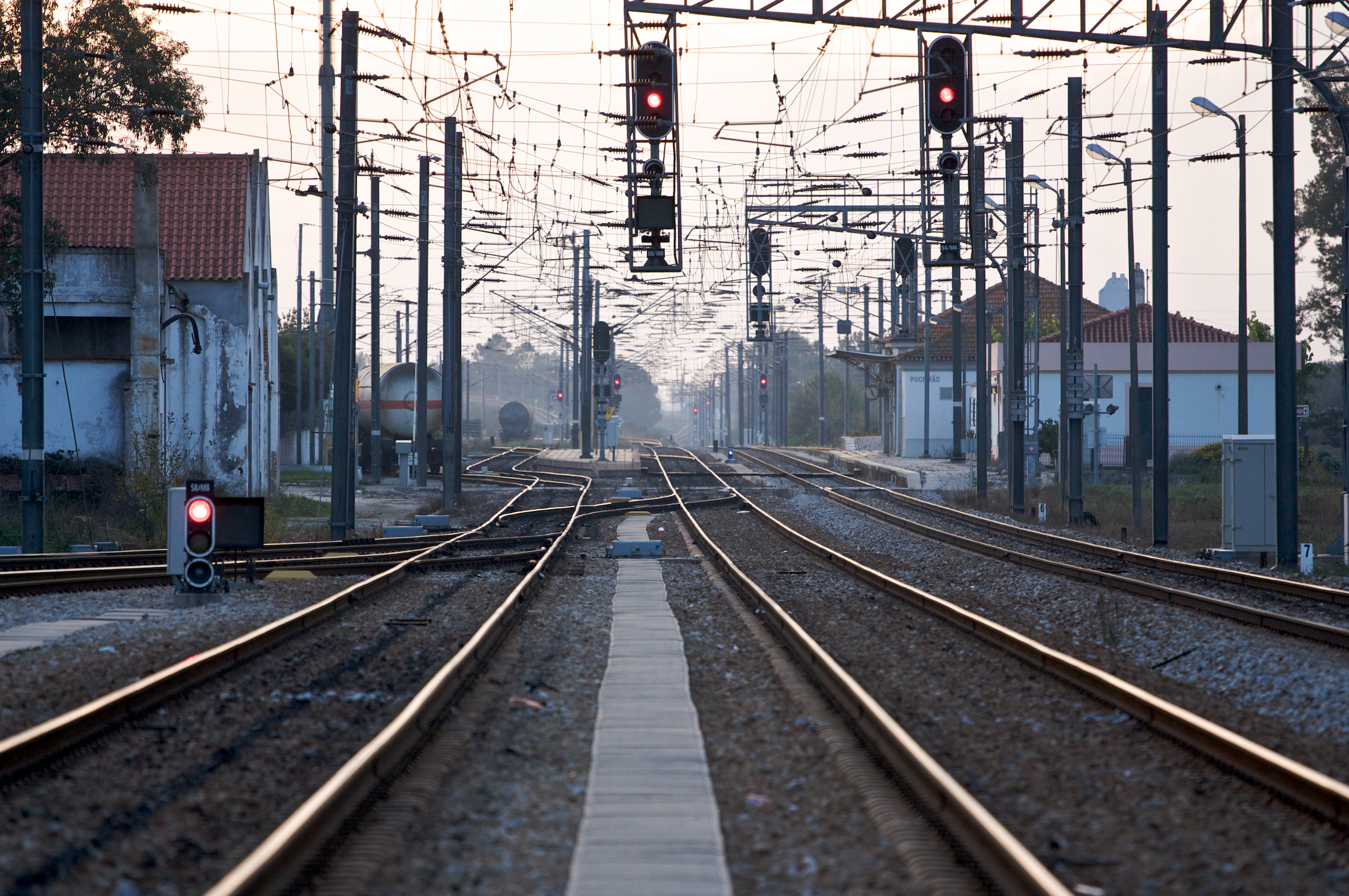 Tipo: EC Estação de Concentração Local: Poceirão Linha do Alentejo, PK 30 Data e hora: 12 de Novembro de 2009 17h12